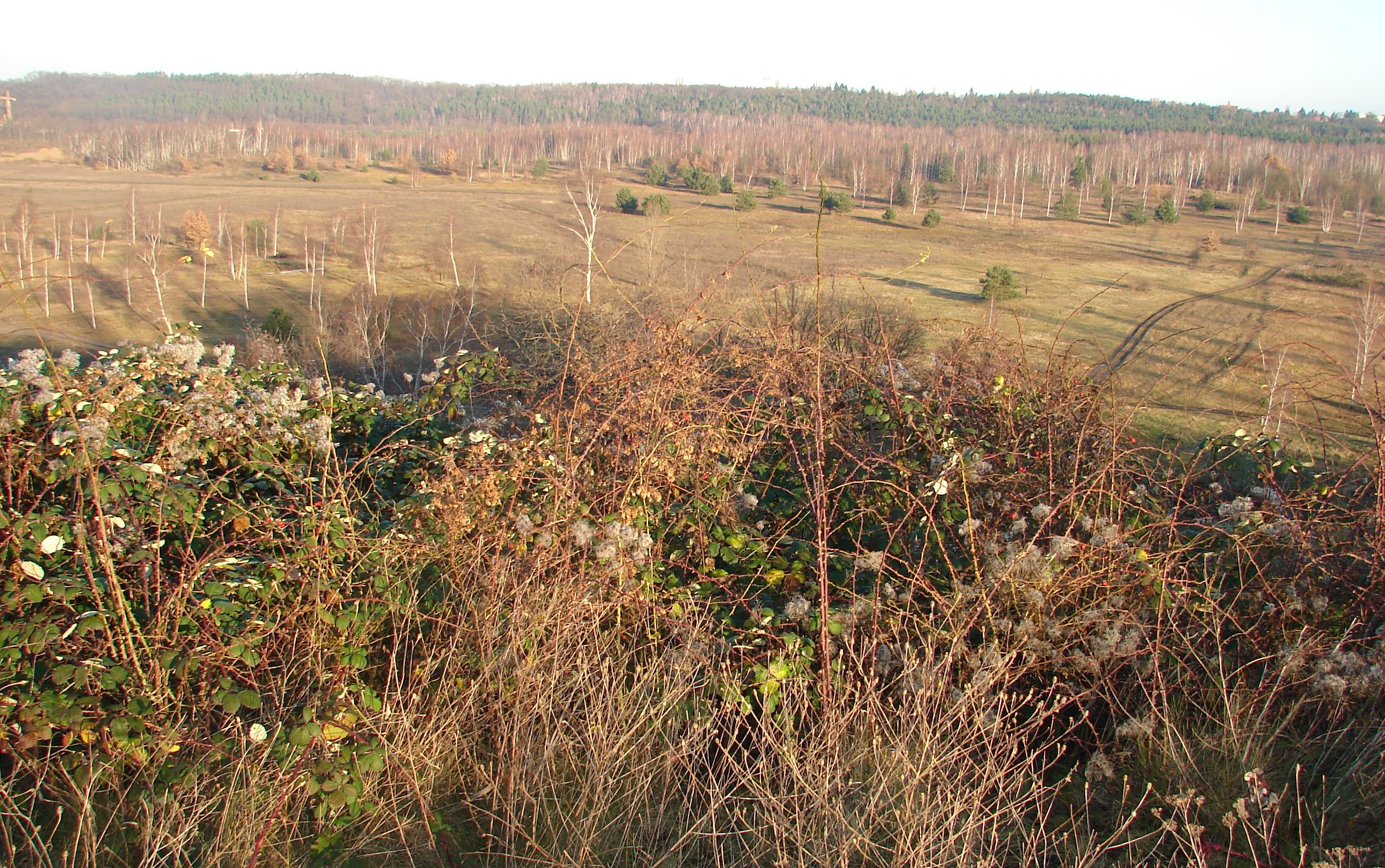 Blick von der Halde zwischen Hammerweg und Hellersiedlung nach Norden über den Heller, im Hintergrund der Geländeanstieg im Zuge der Lausitzer Verwerfung